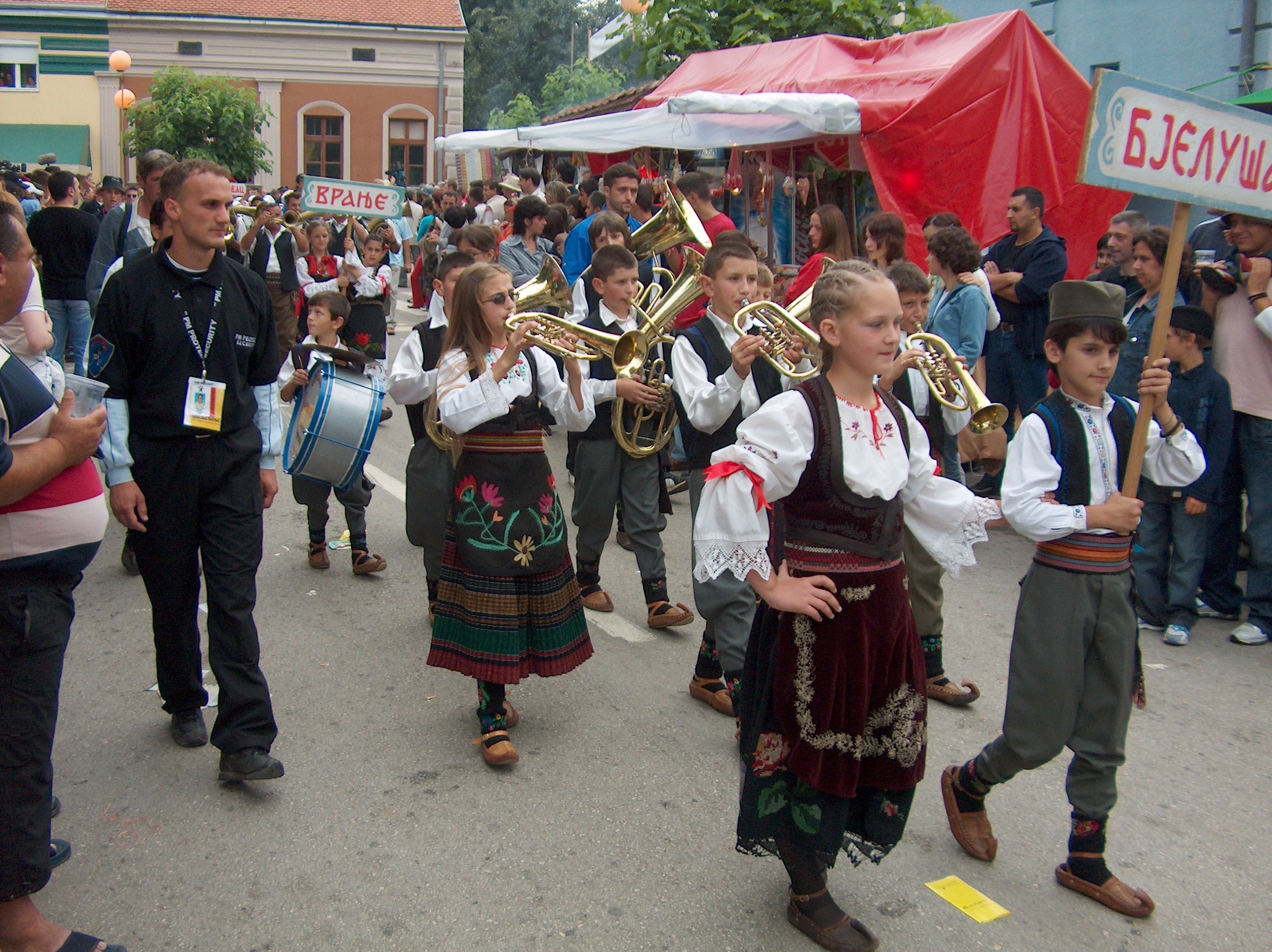 Trumpet festival in Guča, Serbia/Défilé folklorique, festival de trompette de Guča, Serbie